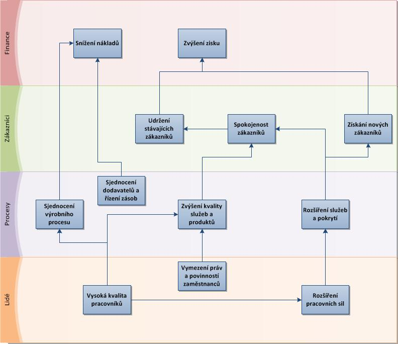 Ukázka modelu BSC